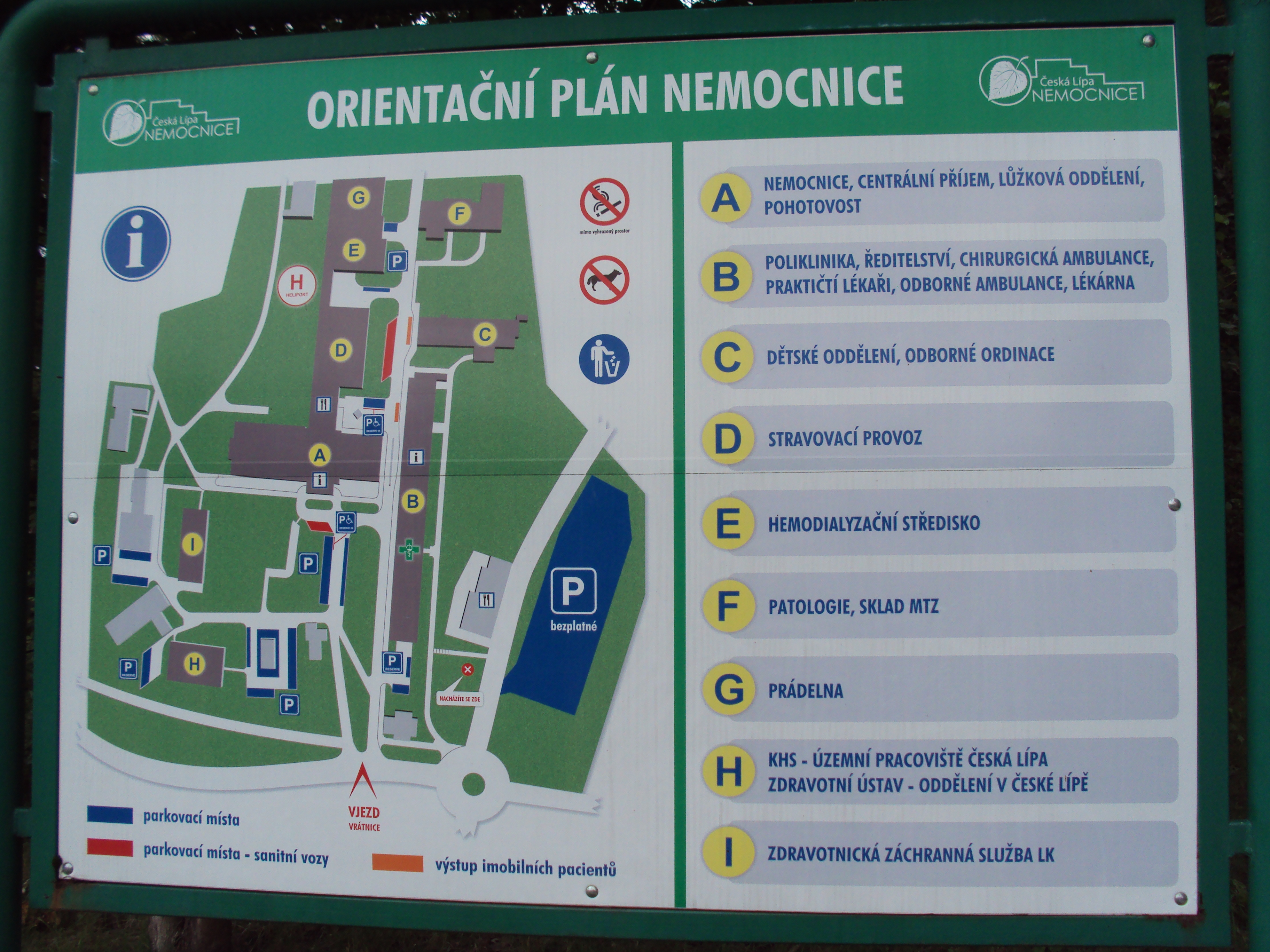 Orientační plán před nemocnicí v České Lípě